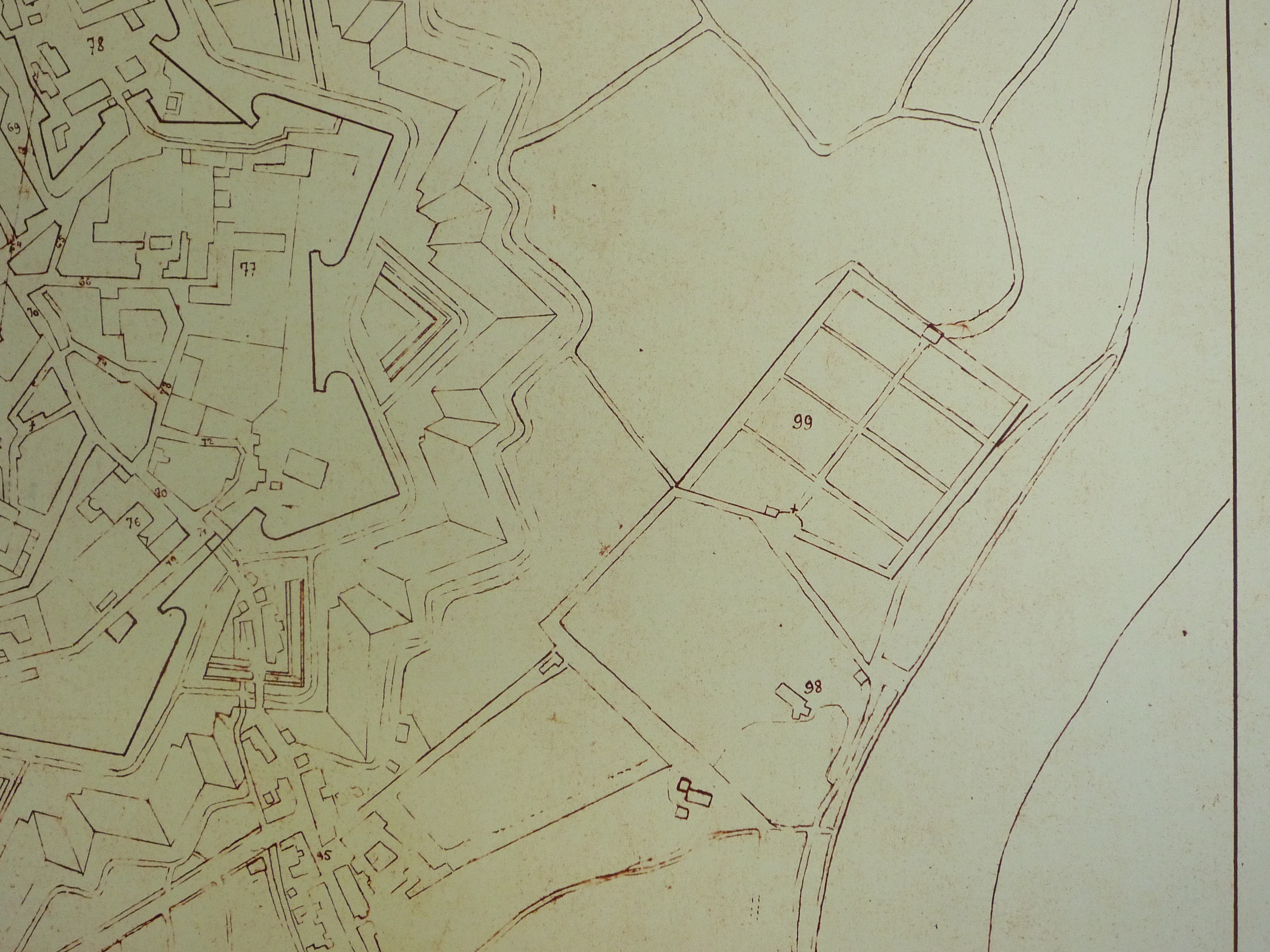 Extrait plan de Grenoble en 1815. Cimetière Saint-Roch (N°99) et ancienne chapelle Saint-Roch (N°98). Porte Très-Cloîtres (1593) en bas à gauche